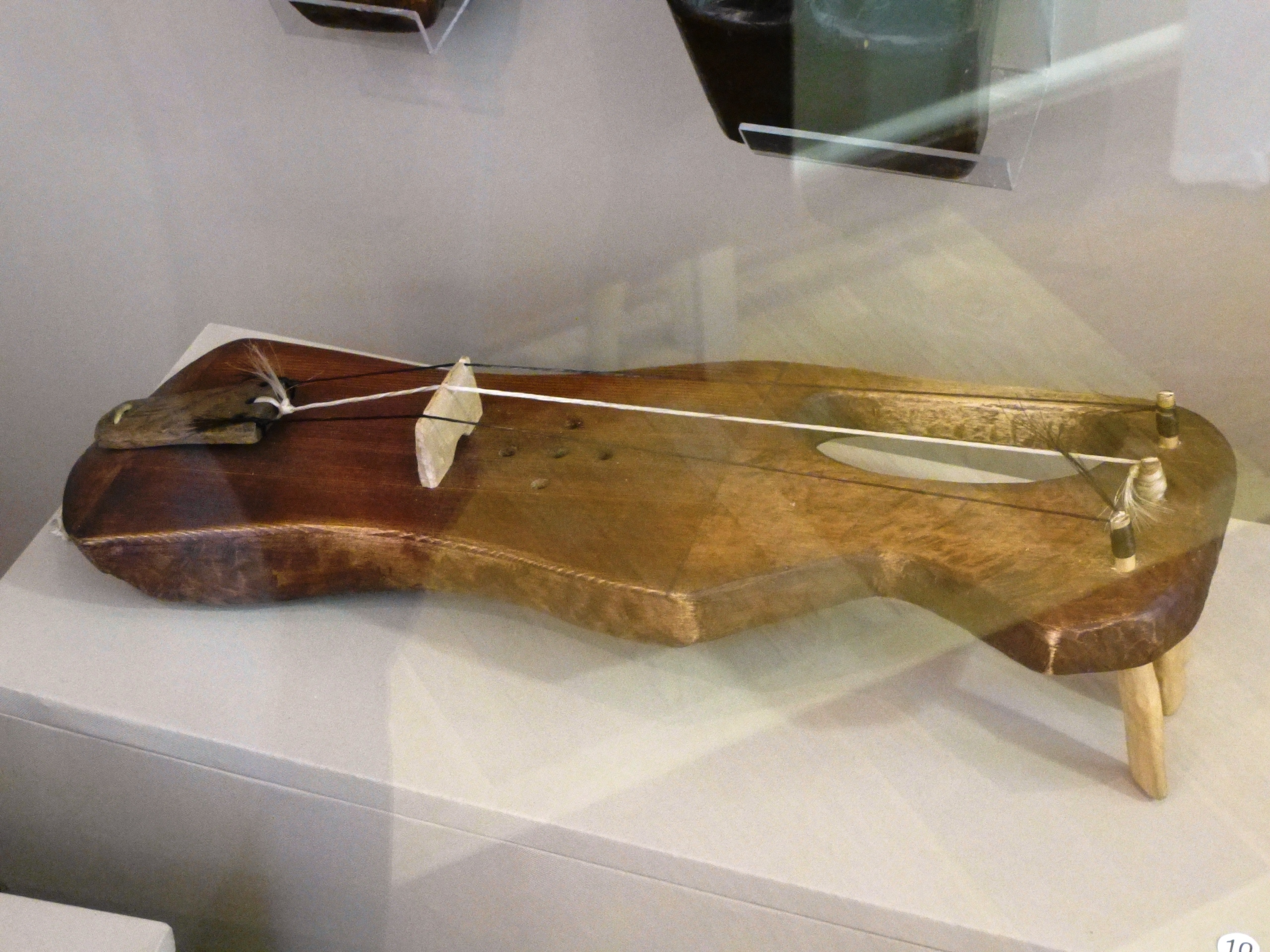 Йоухикко-музыкальный инструмент.(источник - Национальный музей Республики Карелия)